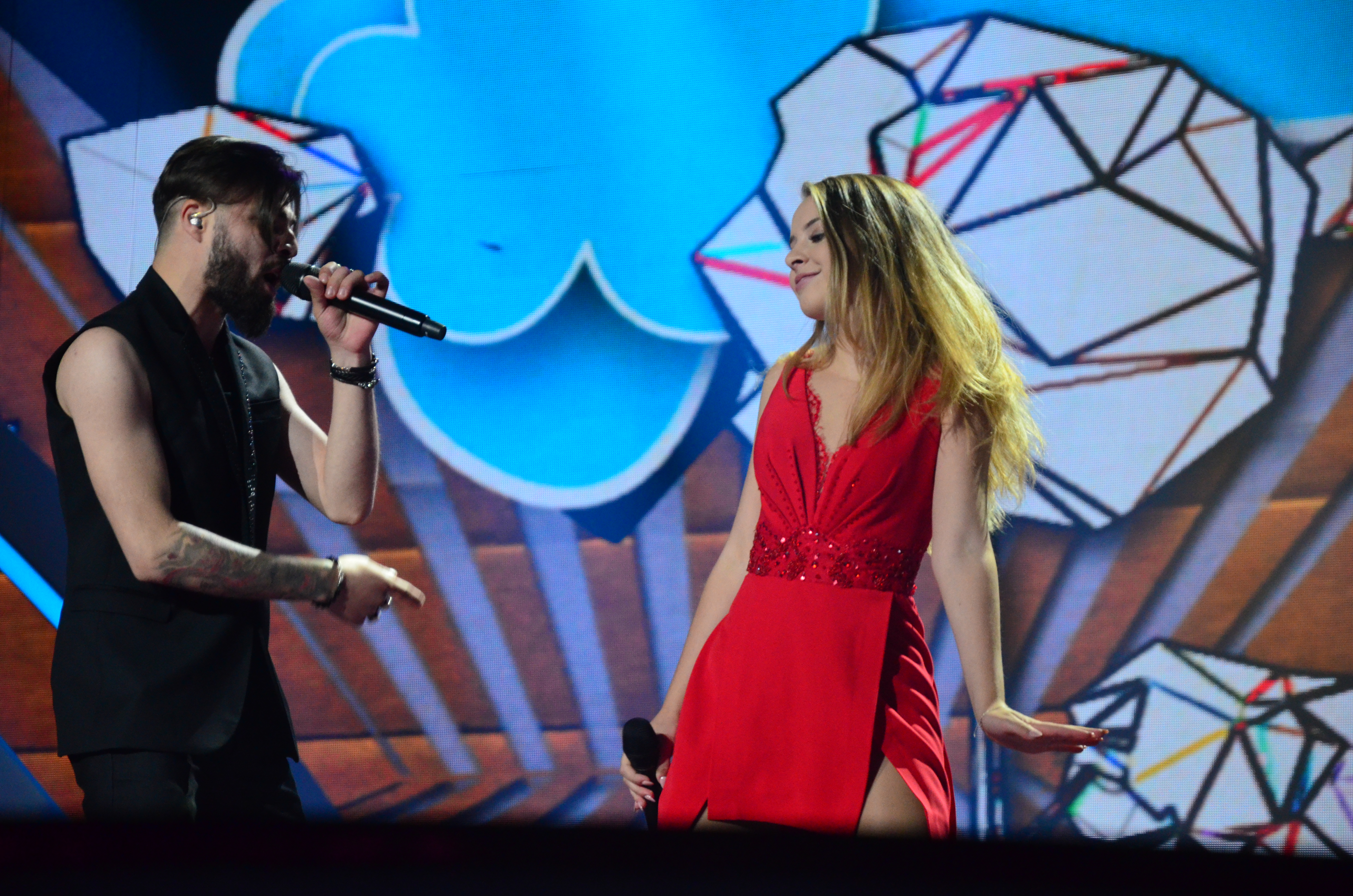 10 травня 2017 року у Києві відбулась генеральна репетиція 2 півфіналу "Євробачення".